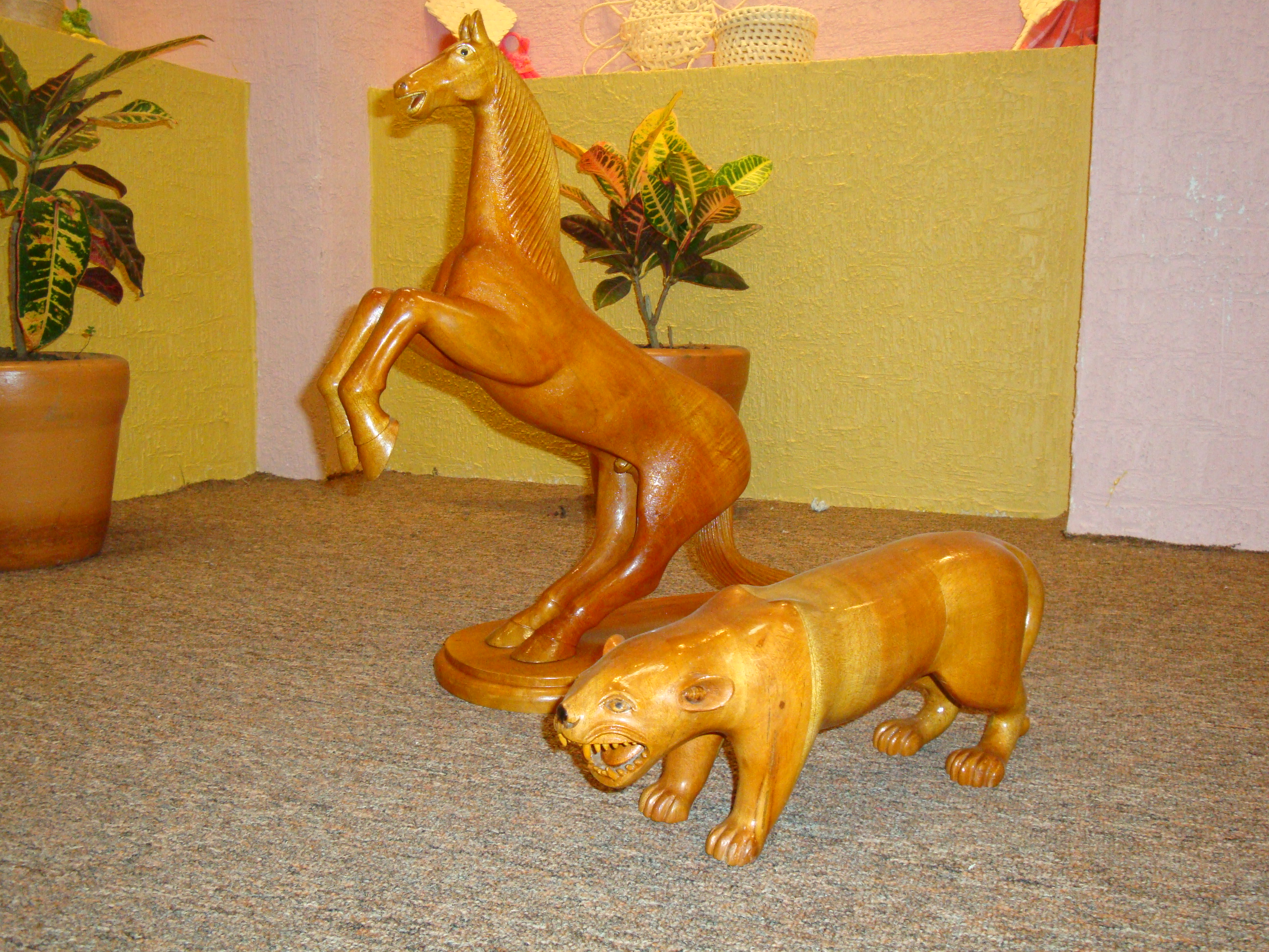 Figuras talladas en madera. Artesanía del municipio de Jonuta, Tabasco, México